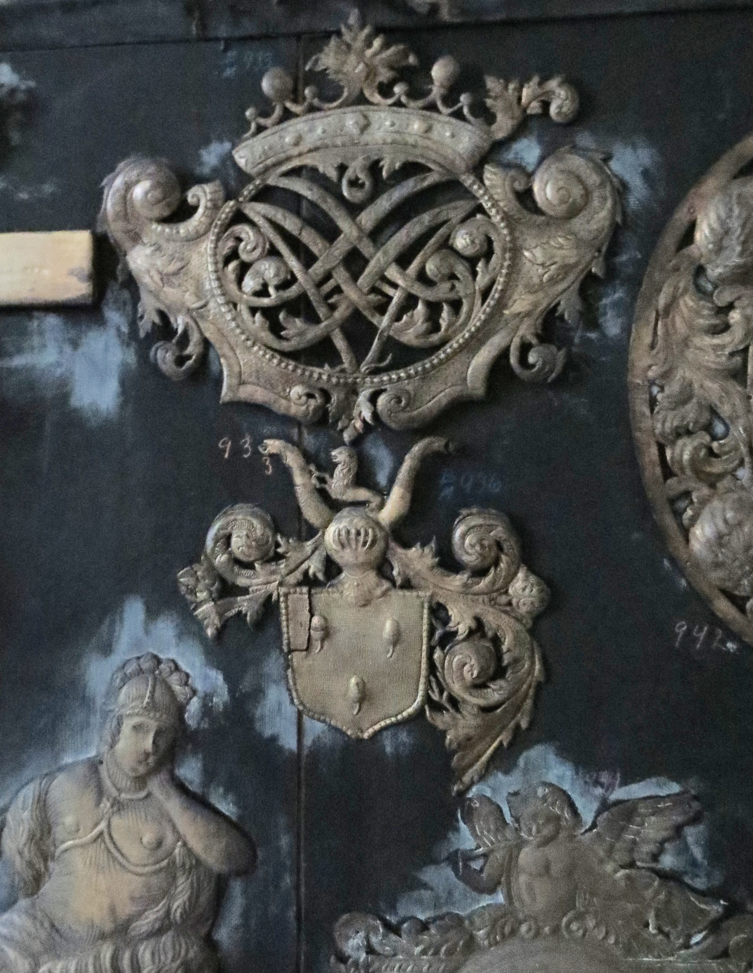 Johan Arnolds våbenskjold med tre agern på et skjold, kronet spejlmonogram samt sørgende kriger. Beslagene stammer fra hans gravkiste i det Arnoldske ligkapel, som han hadde ladet opføre bag koret i Gjerpen Kirke. I dag befinder de sig i Telemark Museums kirkesamlinger i Skien, Telemarken